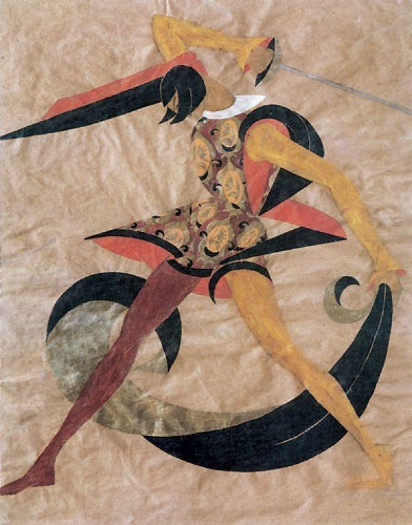 Vera Mukhina A man with a sword. The sketch of the costume drama «Dinner jokes». 1916. Вера Мухина. Эскиз костюма человека со шпагой к драме "Ужин злых шуток". 1916